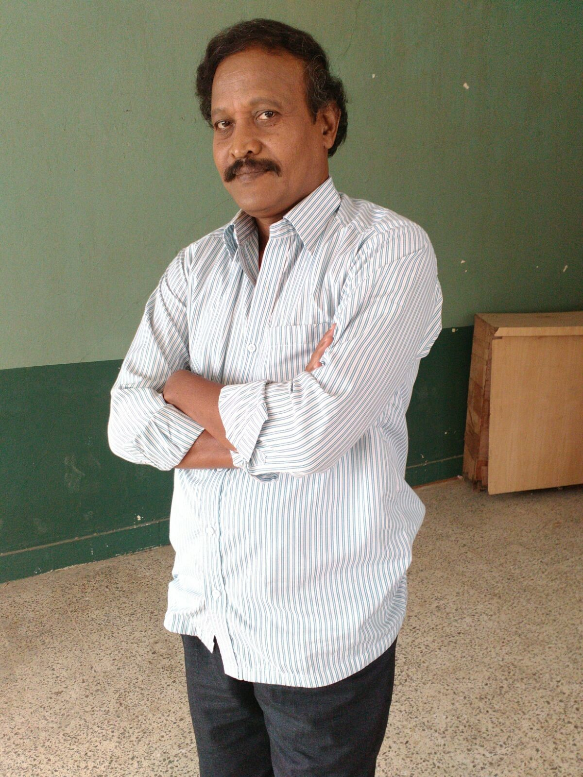 తాతా రమేశ్ బాబు చిత్రము